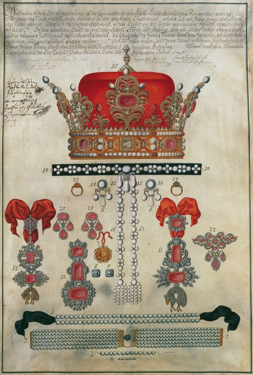 Insignien und Herzogshut der fürstlich liechtensteinischen Primogenitur. Gouache. Liechtenstein Museum